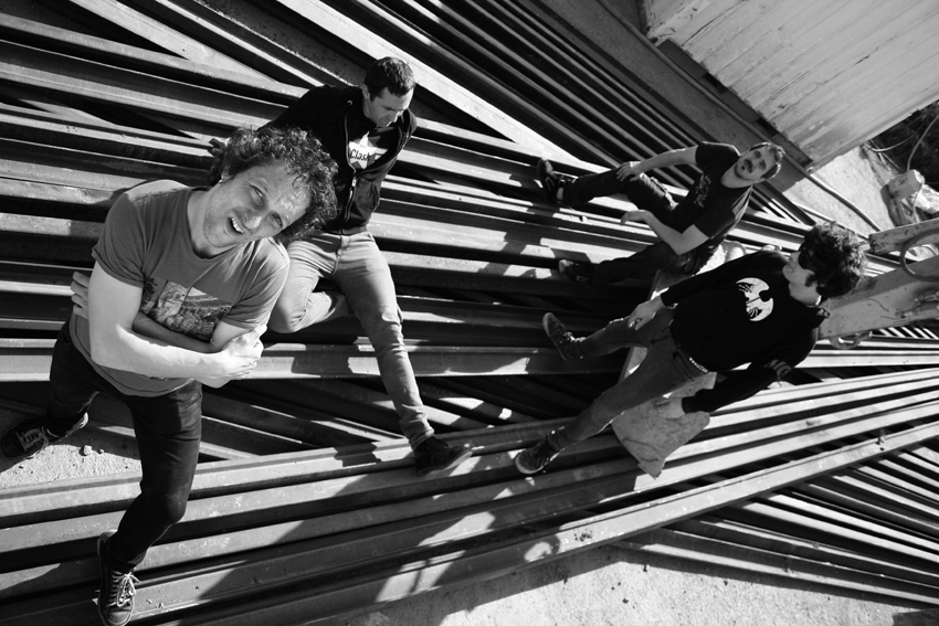 Donostia